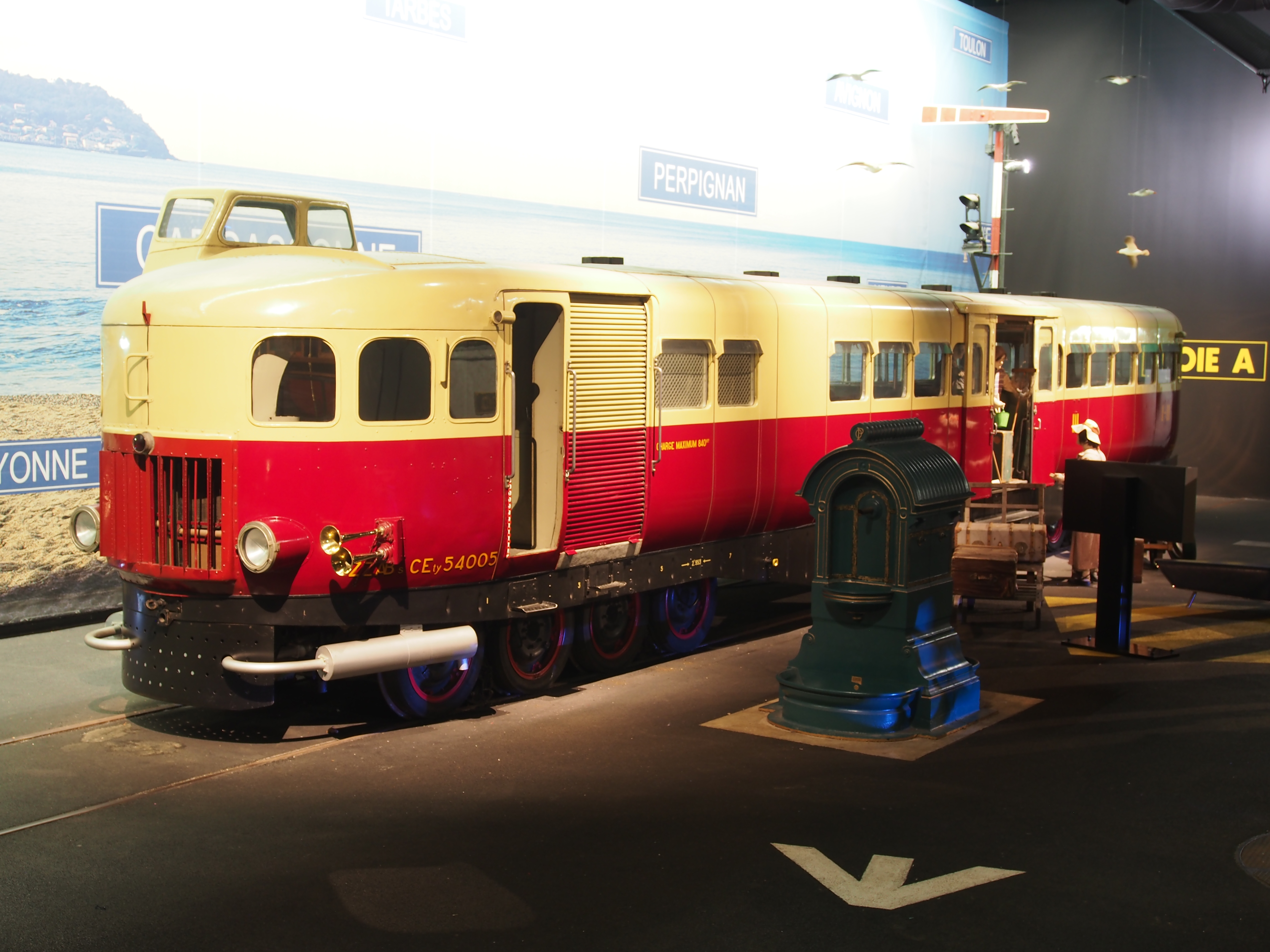 Photographed at Cité du train, Mulhouse, France.